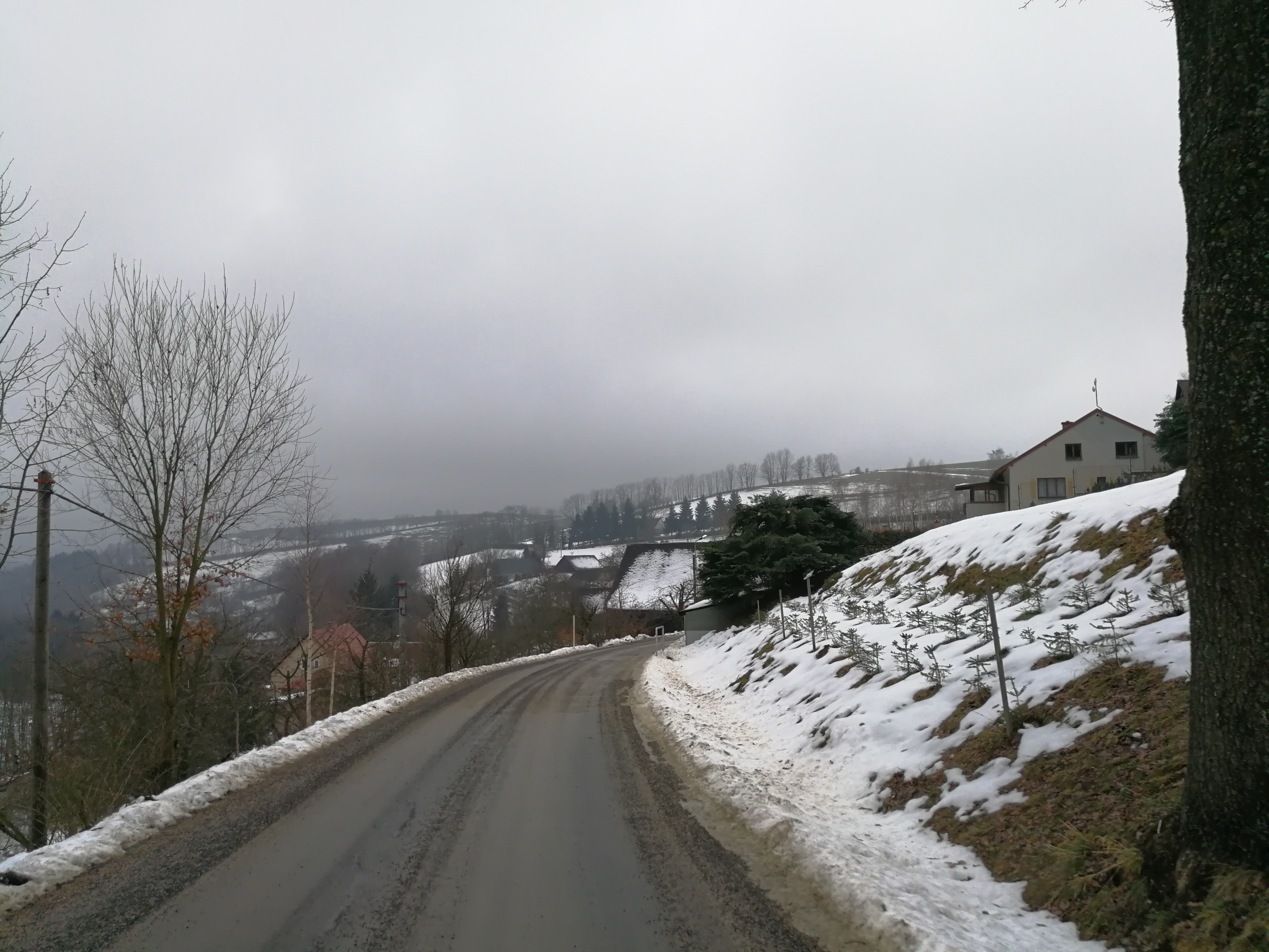 Cesta. Víchovská Lhota.